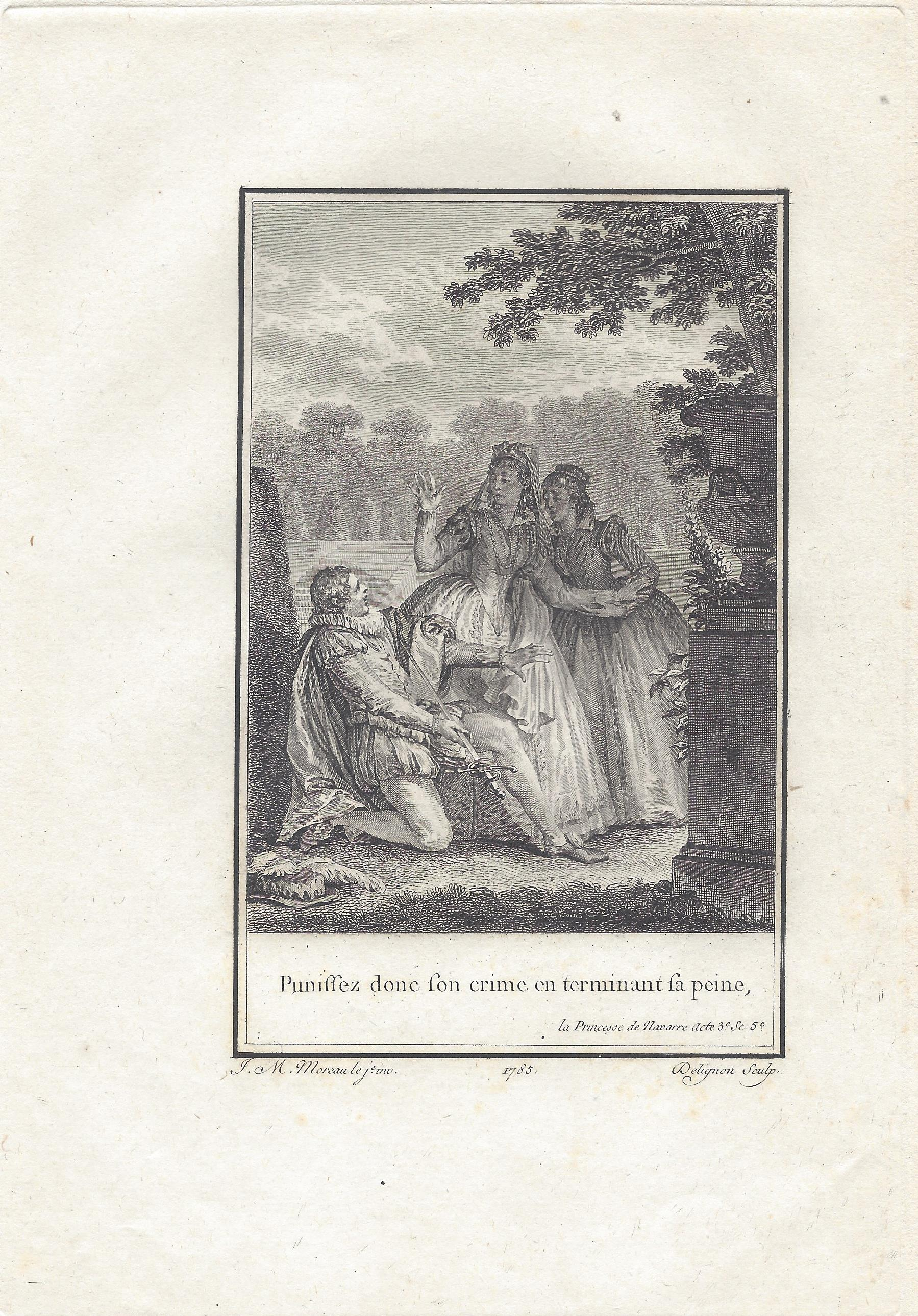 Voltaire: La Princesse de Navarre Akt 3 Szene 5 Kupferstich von Simonet nach Jean-Michel Moreau